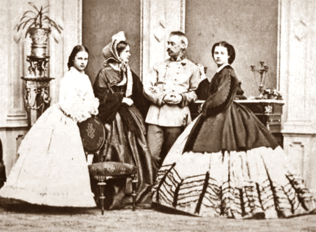 Arquiduque Alberto Frederico de Áustria-Teschen e sua família: Arquiduquesa Matilde, Princesa Hildegarda da Baviera († 1864) e Arquiduquesa Maria Teresa.